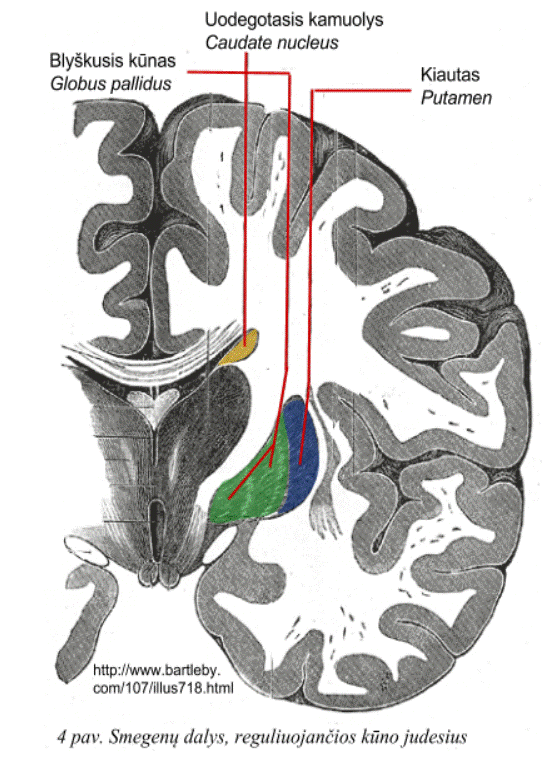 Uodegotasis kamuolys, blyškusis kūnas ir kiautas